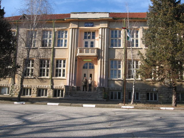 Основно Училище "Отец Паисий" построено през 1932г.